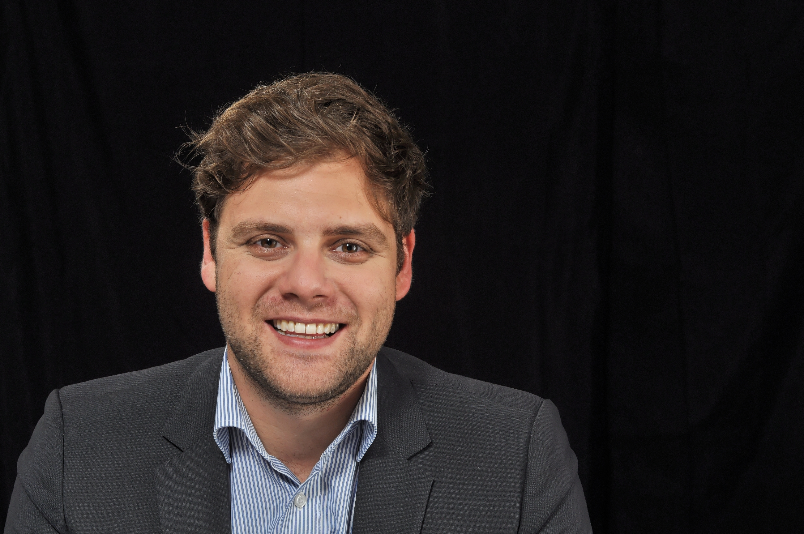 Florian Wahl 2013 Personality rights warning Although this work is freely licensed or in the public domain, the person(s) shown may have rights that legally restrict certain re-uses unless those depicted consent to such uses. In these cases, a model release or other evidence of consent could protect you from infringement claims.